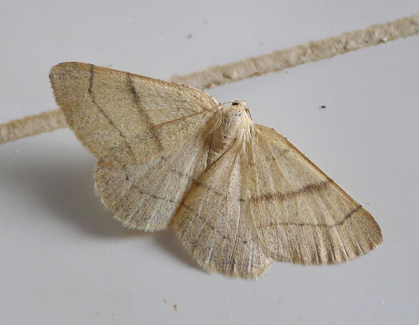 Adactylotis gesticularia. Geometridae. Ennominae. Boarmiini